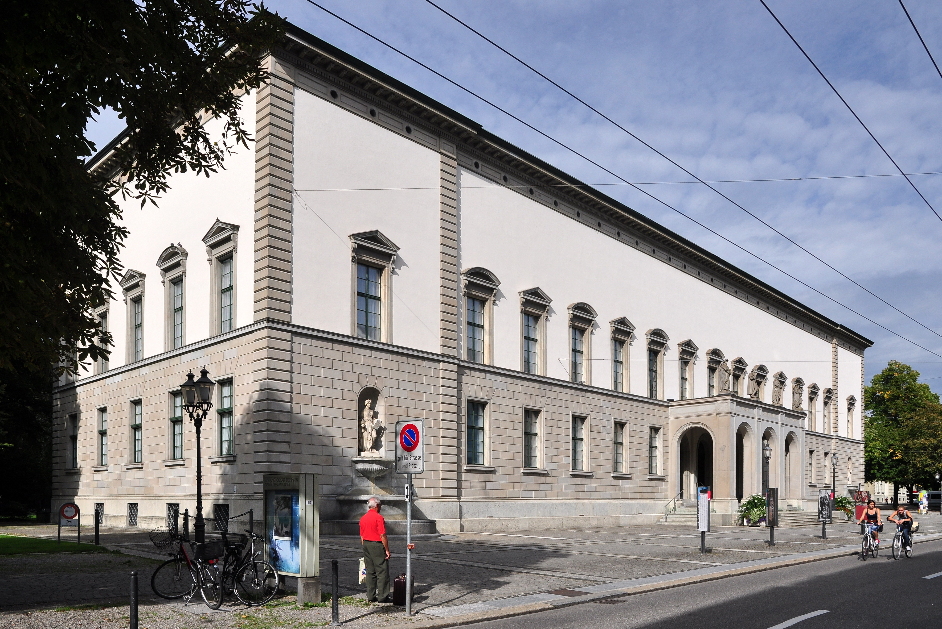 Stiftung Oskar Reinhart (ehemaliges Knabenschulhaus) sowie Museum Oskar Reinhart, Stadthausstrasse 6 in Winterthur (Switzerland)